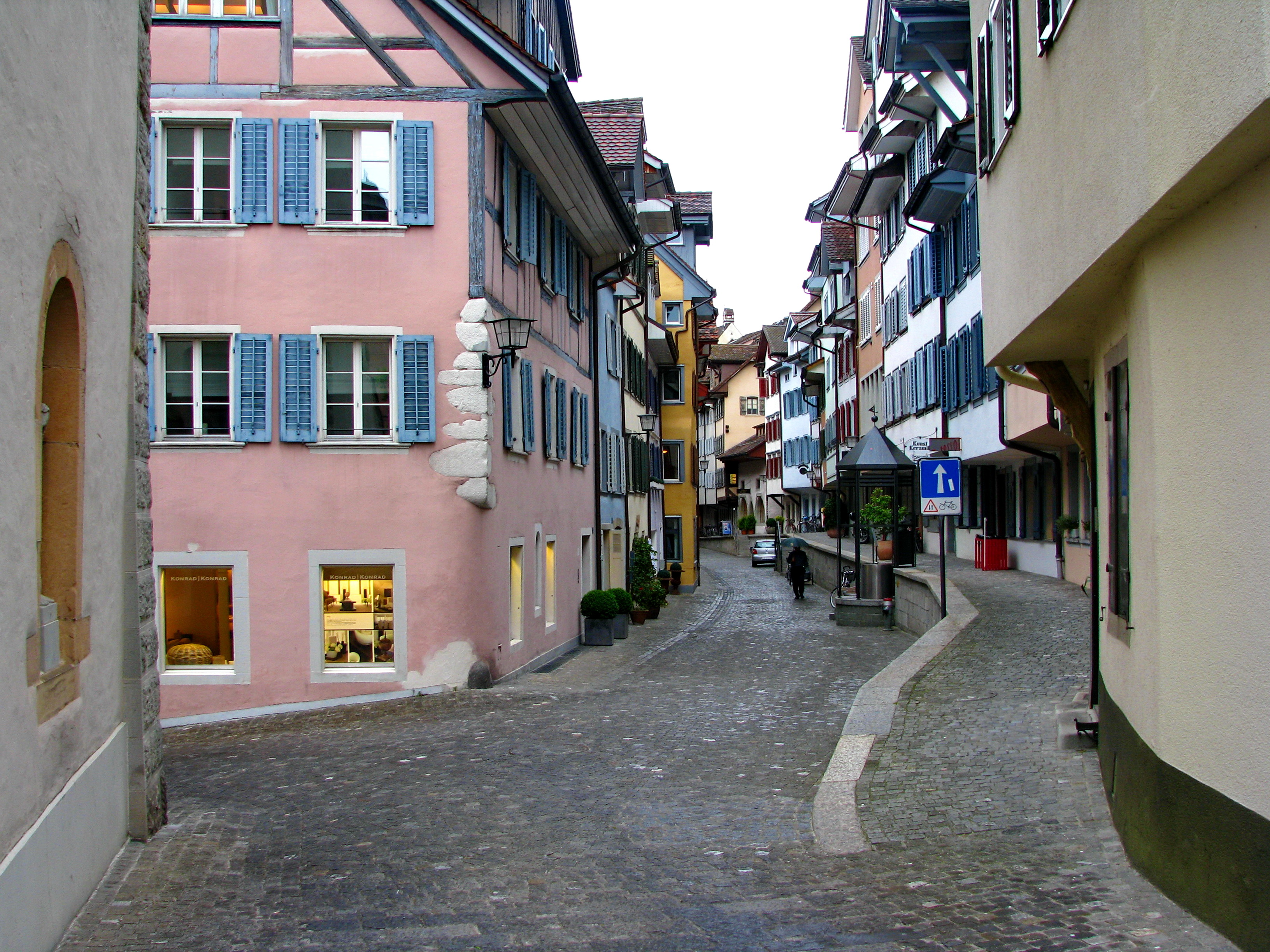 Oberaltstadt in Zug (Switzerland)